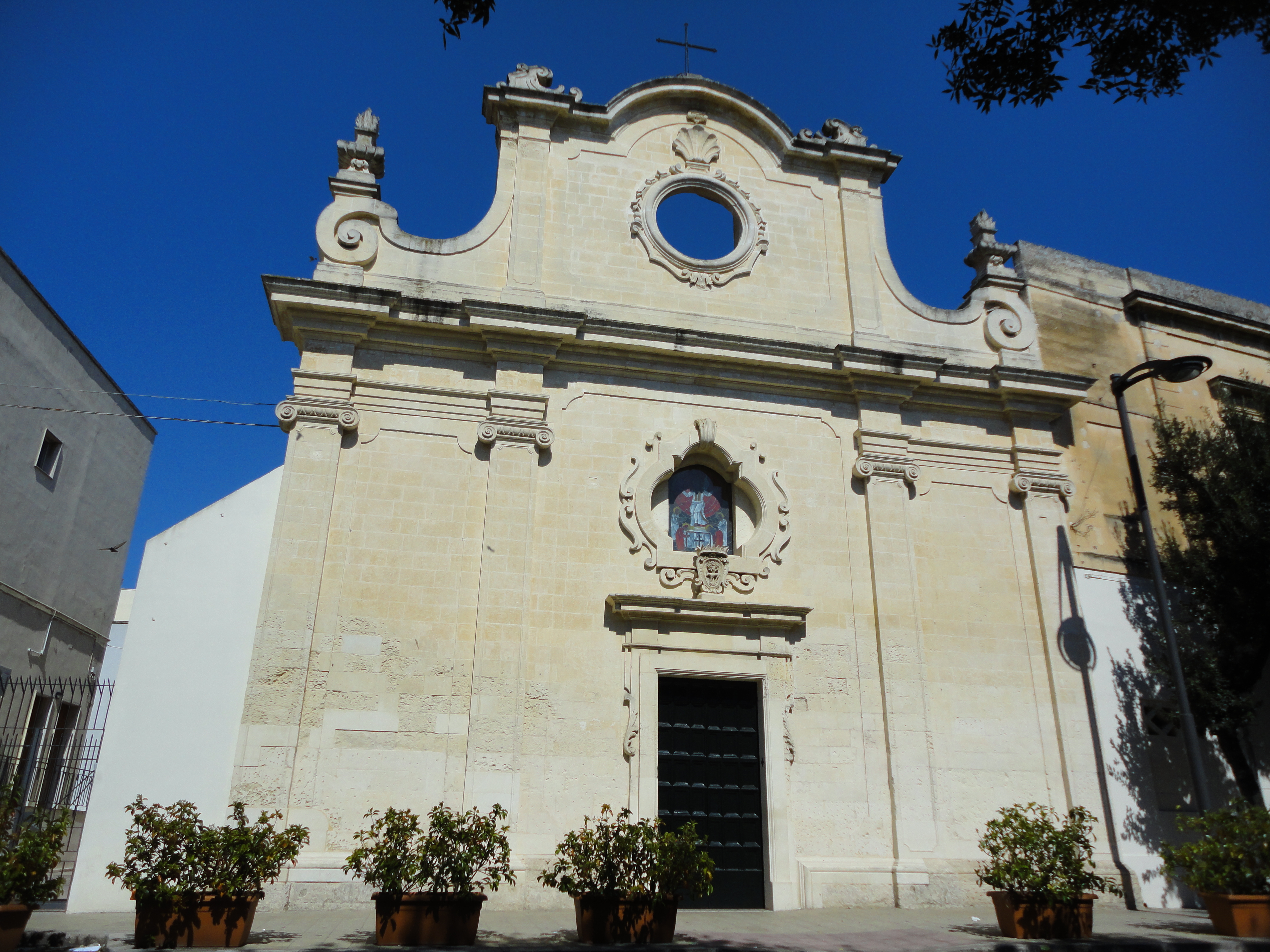 Chiesa di San Lazzaro Lecce